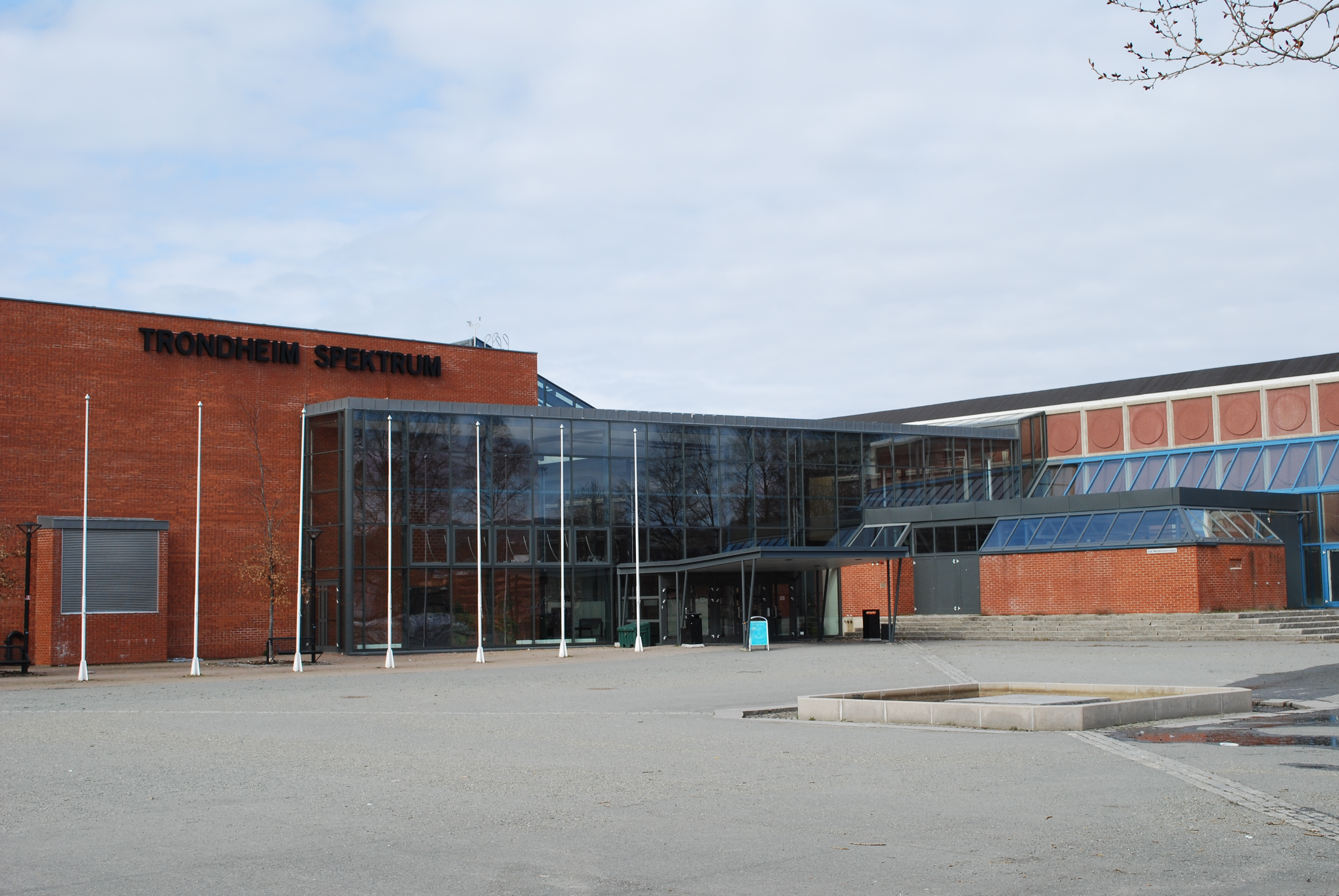 Trondheim Spektrum, tidligere Nidarøhallen, en flerbrukshall på Øya i Trondheim.